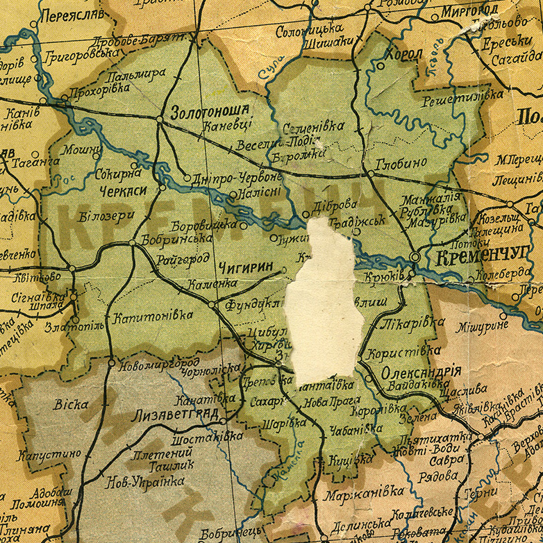 Кременчуцька губернія, фрагмент мапи Української соц. рад. республіки, січень 1922